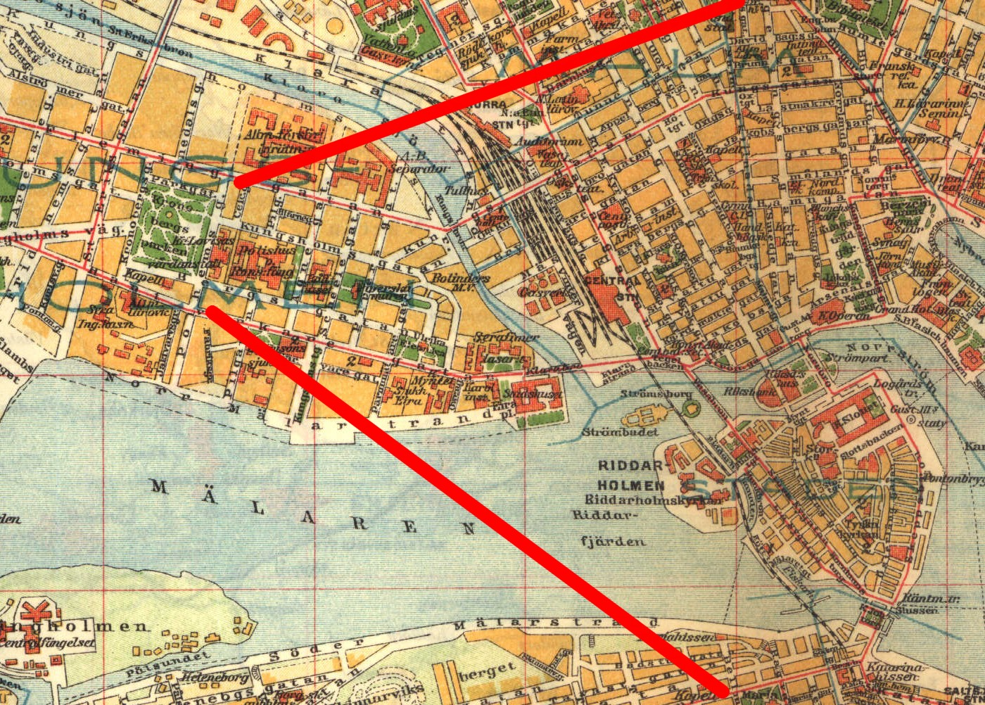 Blickvinkel för panoramabilder över Stockholn från Kungsholmen